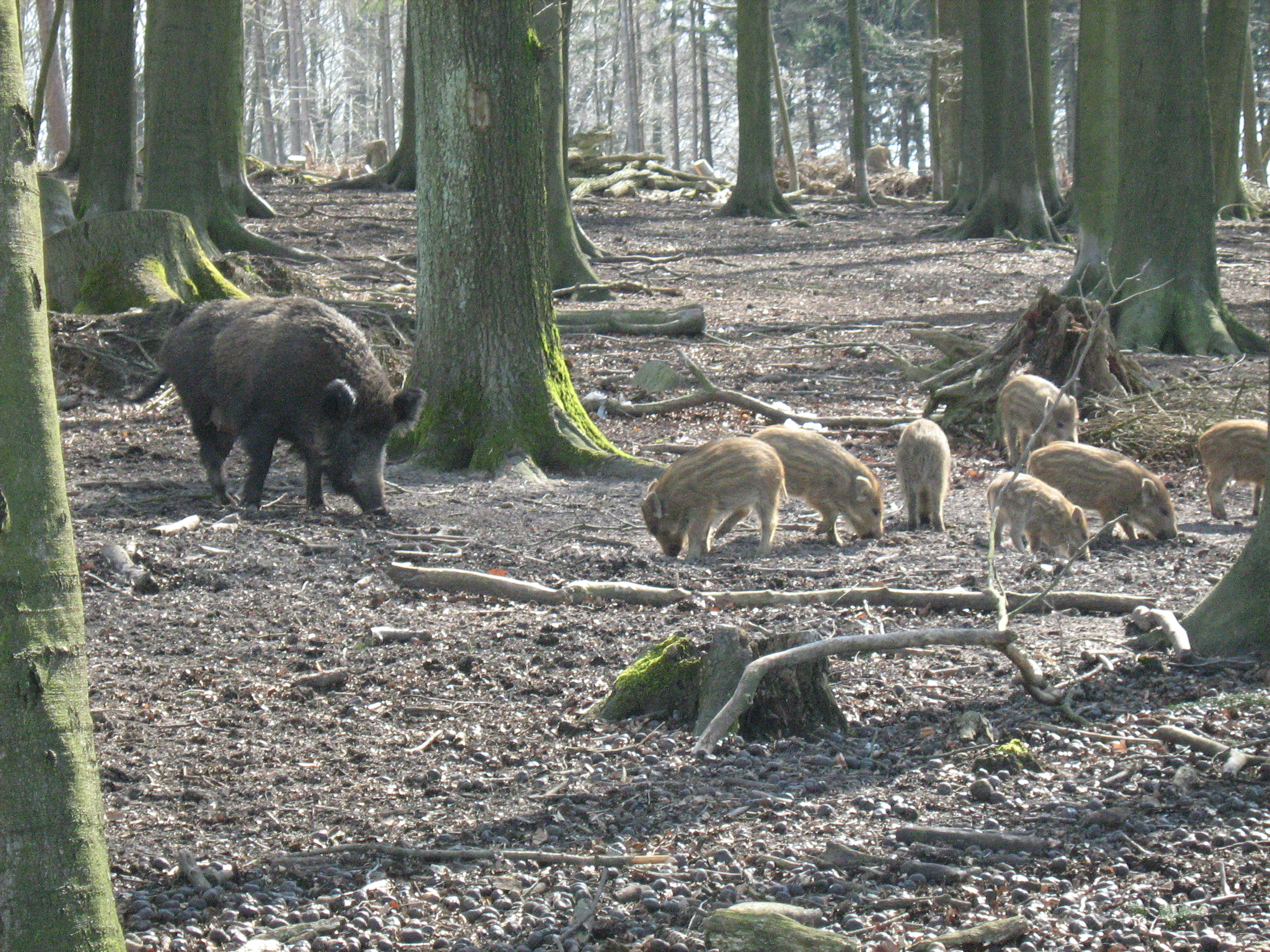 Wildschweine bei der Diedrichsburg (Melle Frühjahr 2008)